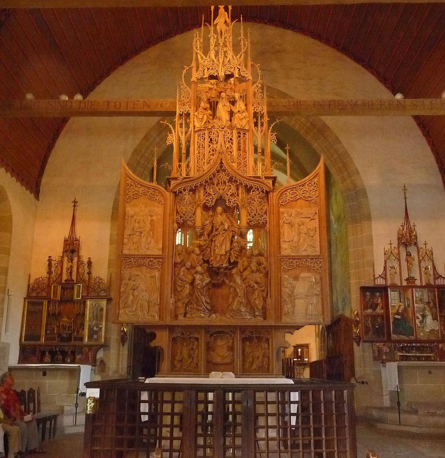 Marien-Altar von Tilman Riemenschneider in Creglingen, Franken